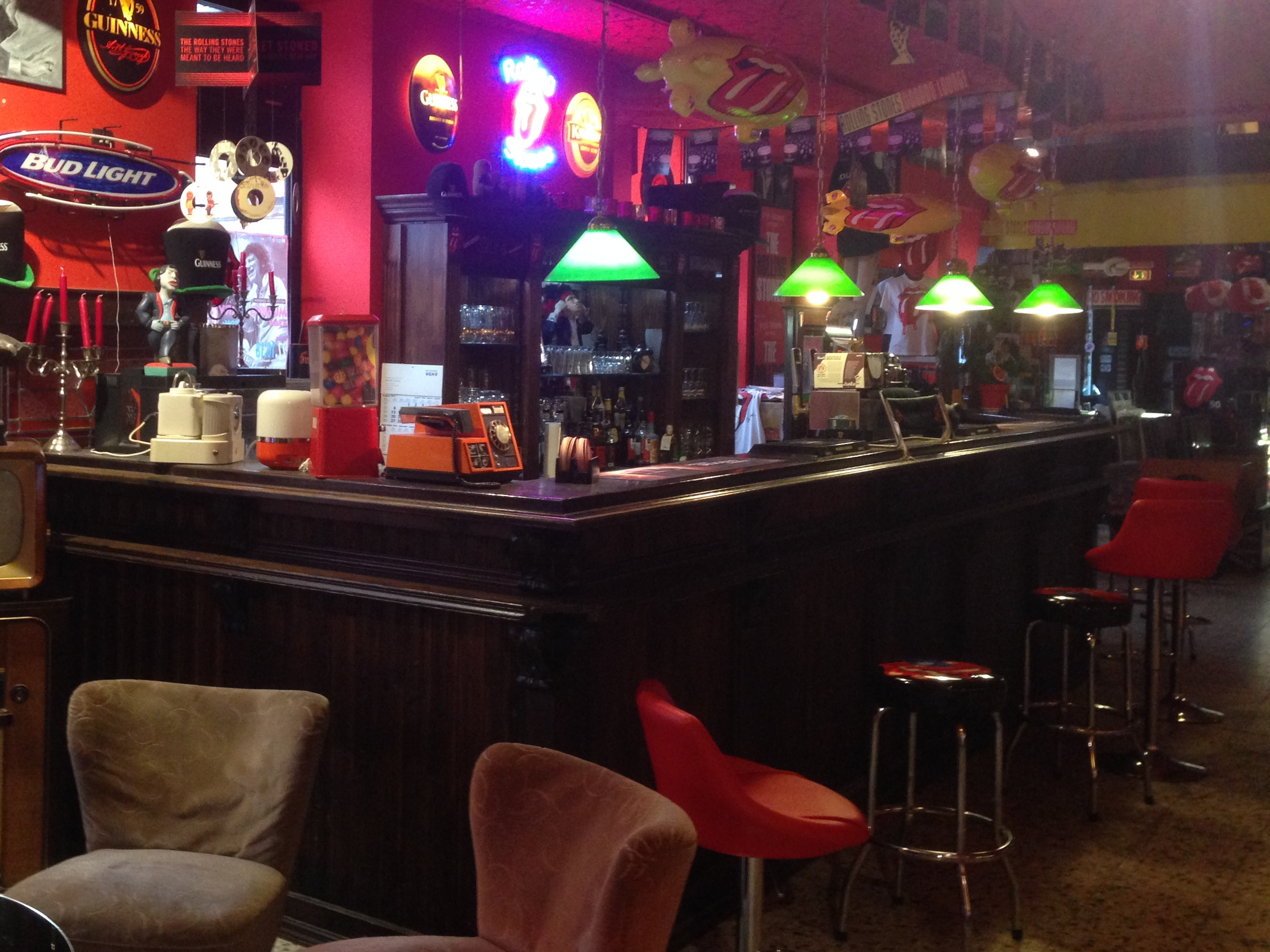 Stones Fan Museum, Lüchow, Germany